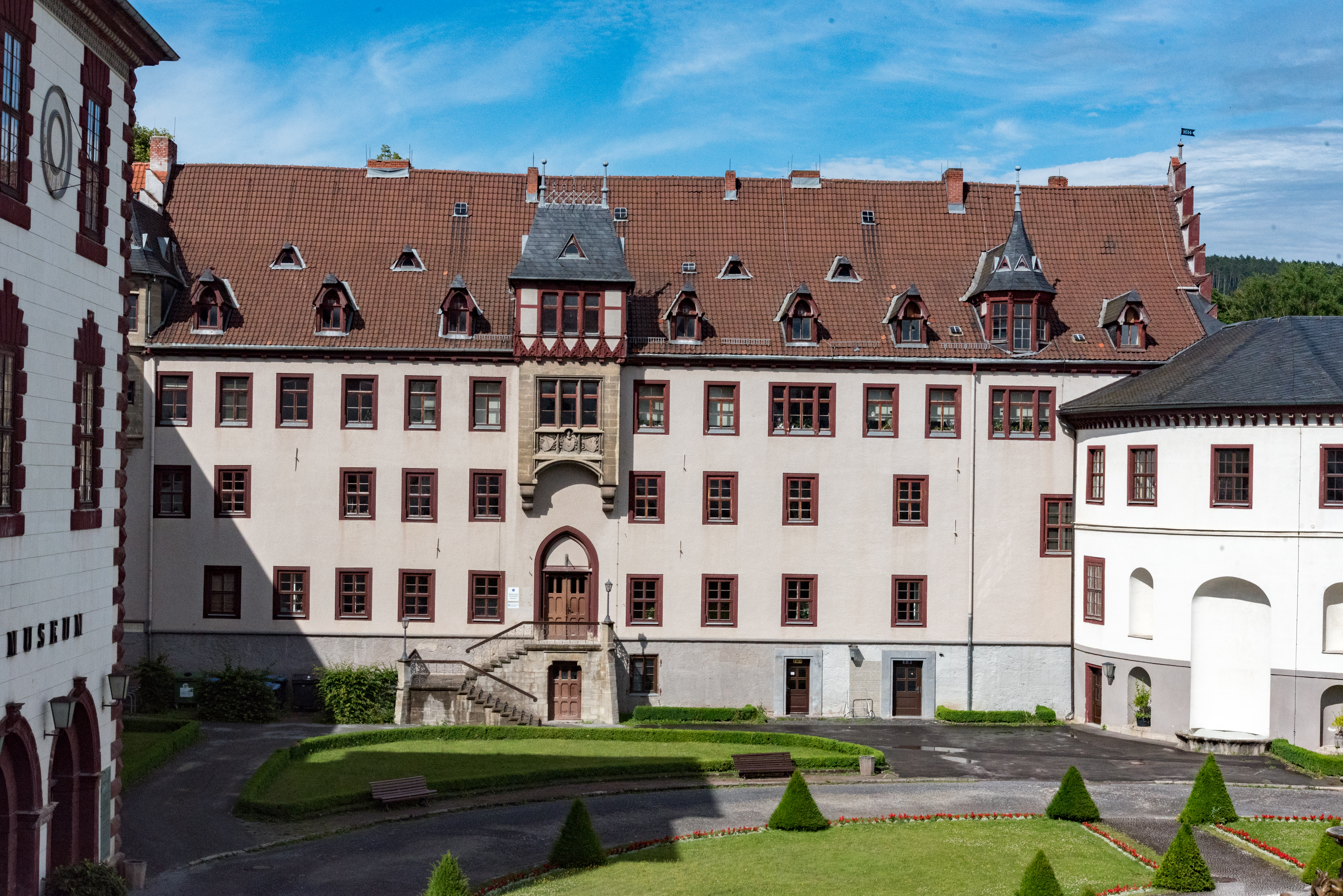 Meiningen, Schloss Elisabethenburg, Exterior